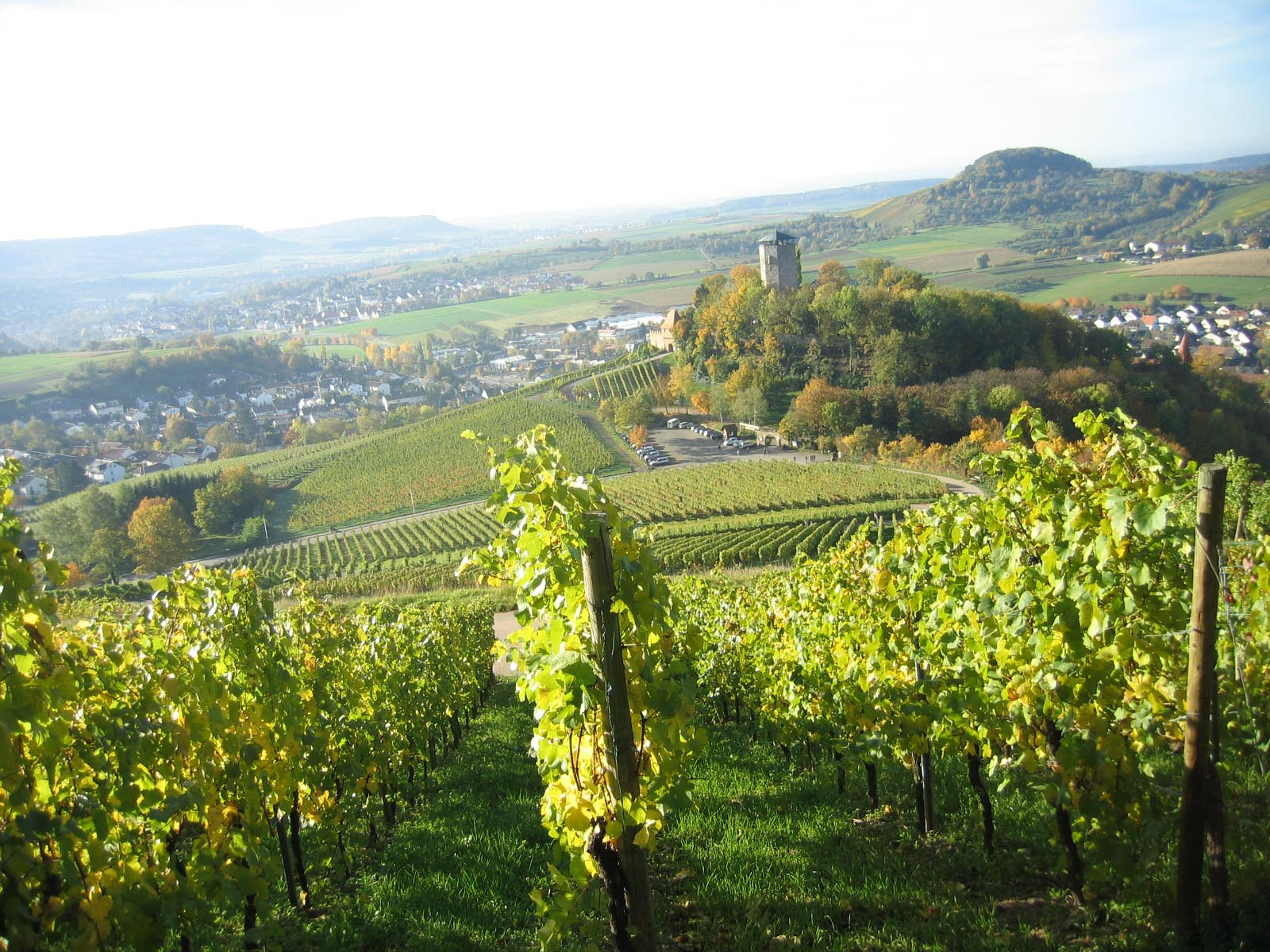 View at Beilstein